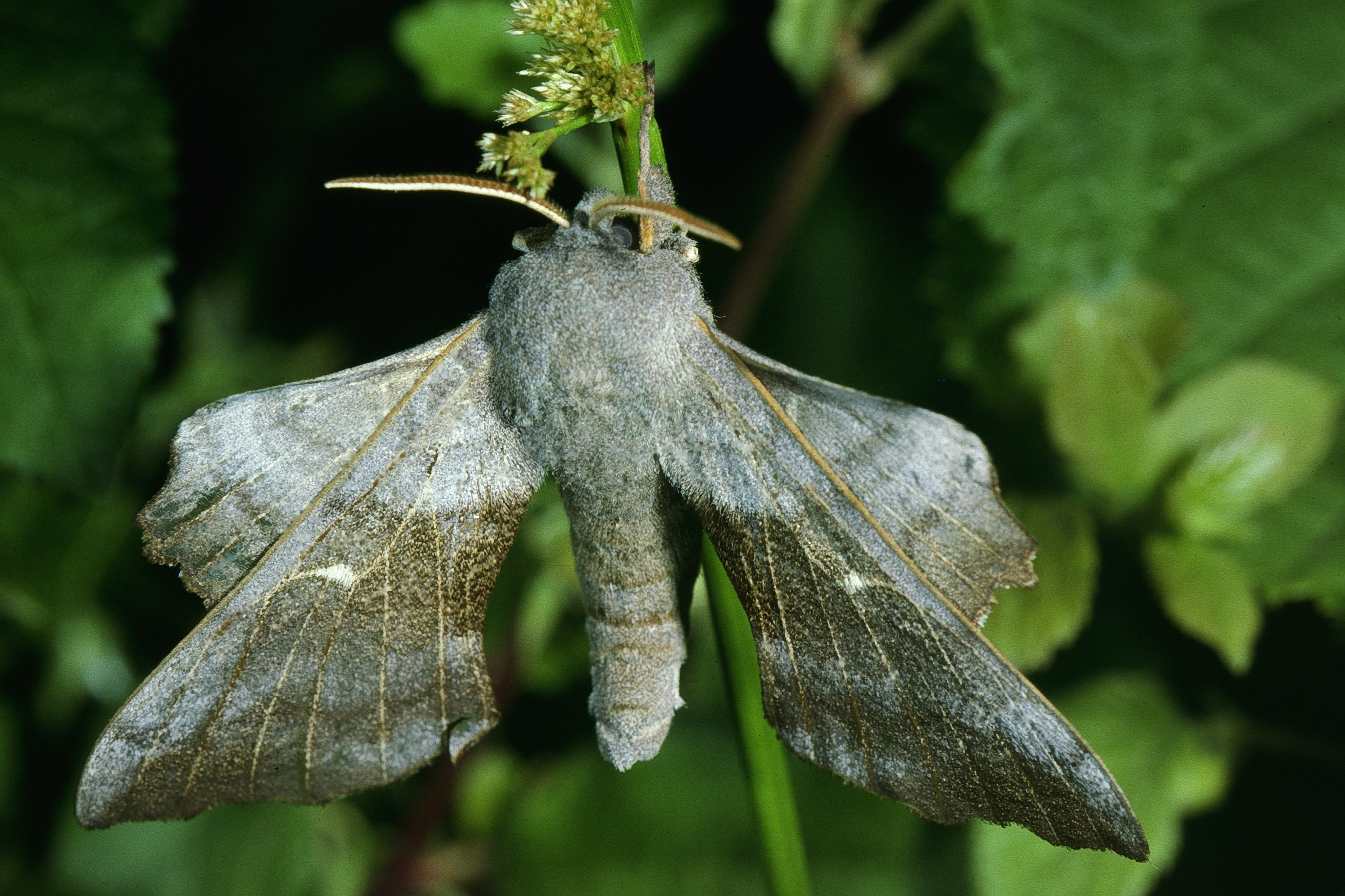 Lépidoptère nocturne Laothoe populi. Chasse photo de nuit réalisée en Basse-Normandie France.